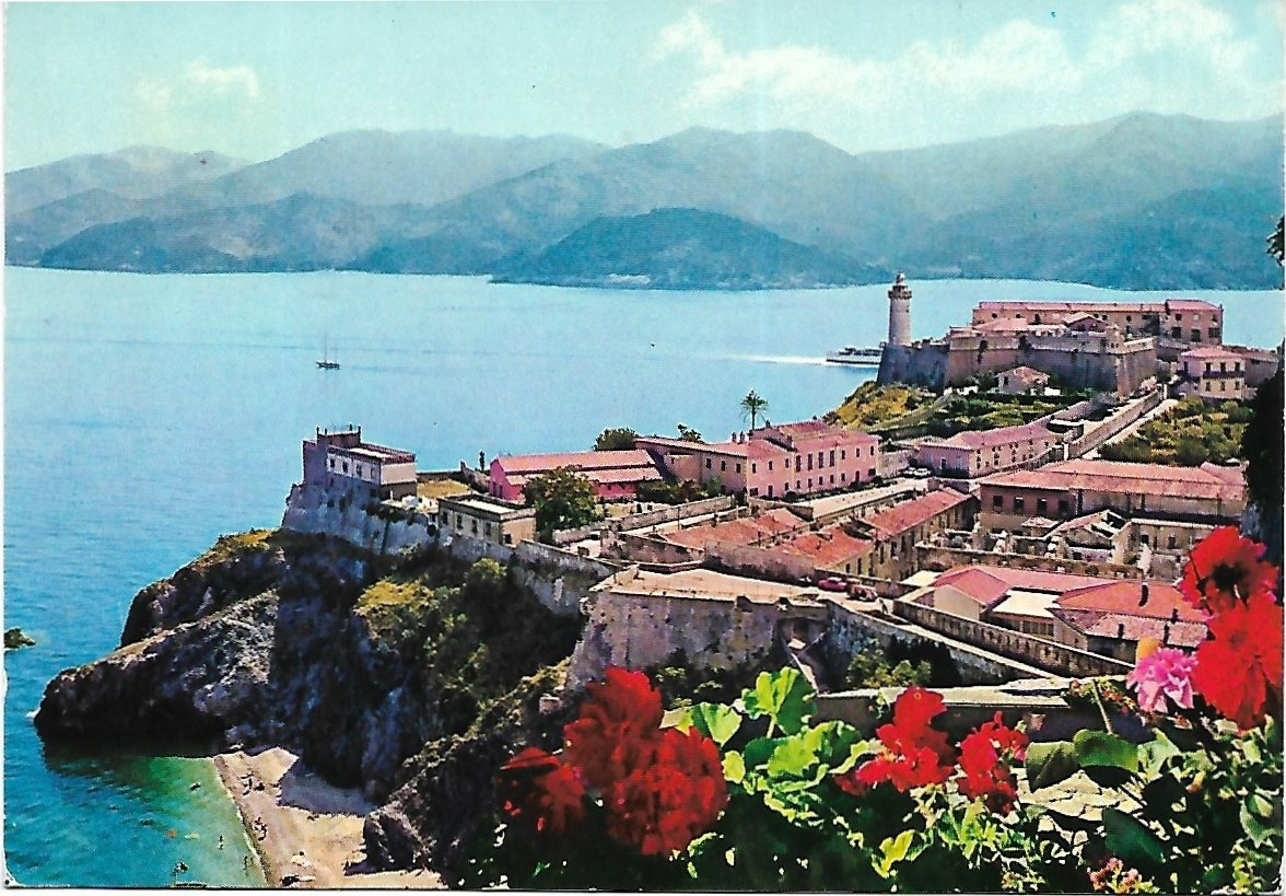 Isola d'Elba - Portoferraio forte Stella